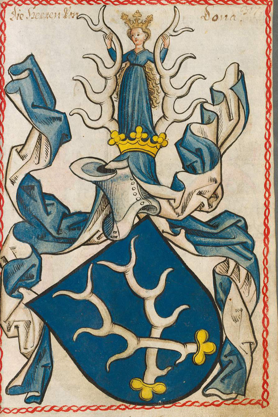 Scheibler'sches Wappenbuch , älterer Teil Meißner Dohna